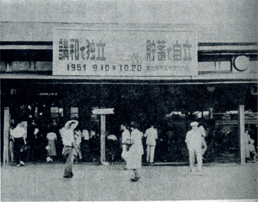 昭和26年、空襲後の富山駅仮駅舎